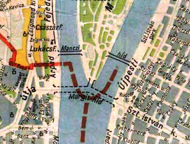 A "Manczi híd" egy 1947-es térképen